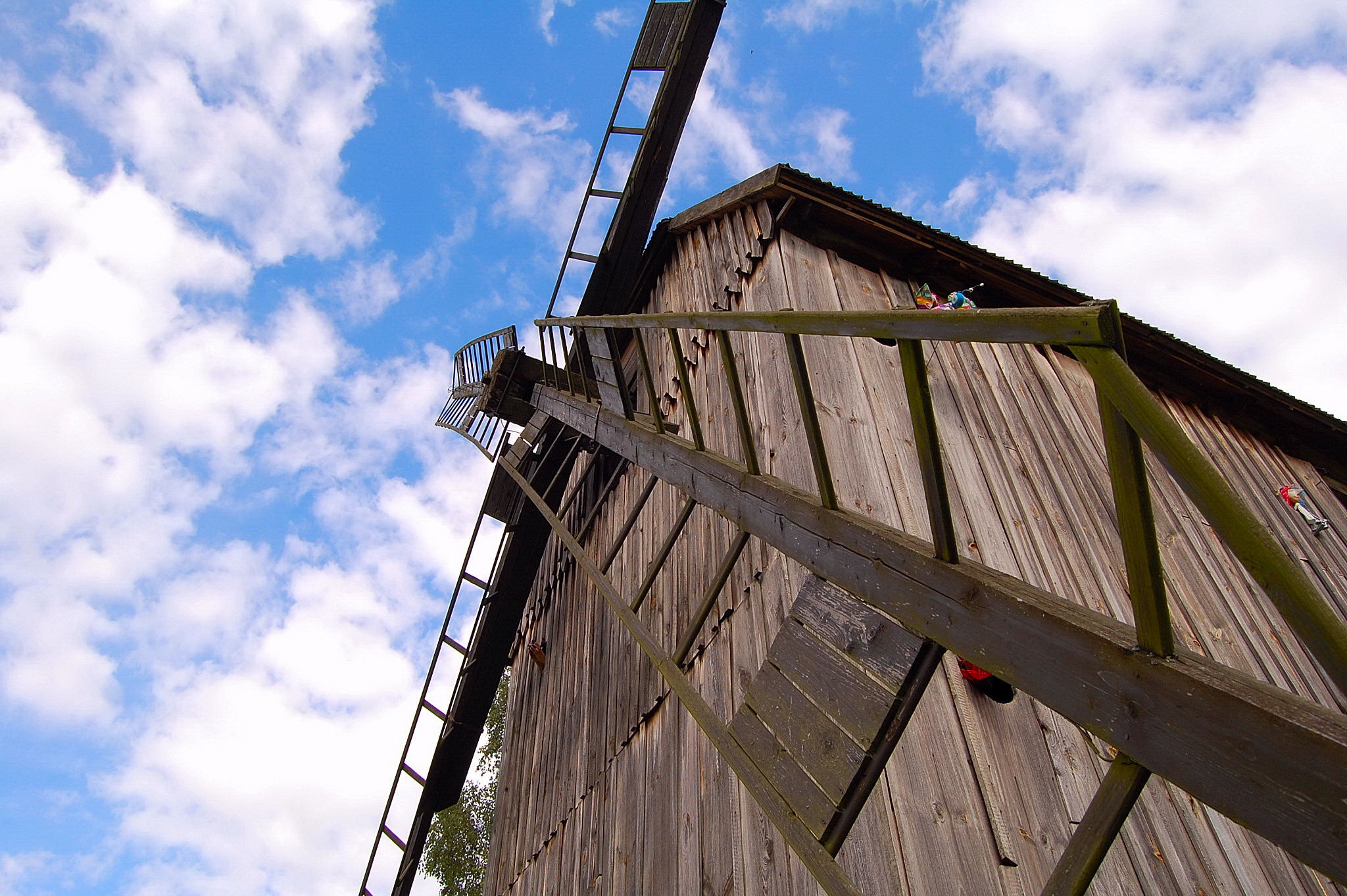 Wiatrak koźlak, XIX, 1934, pierwotnie z Wołoskowoli, ob. w Skansenie w Holi